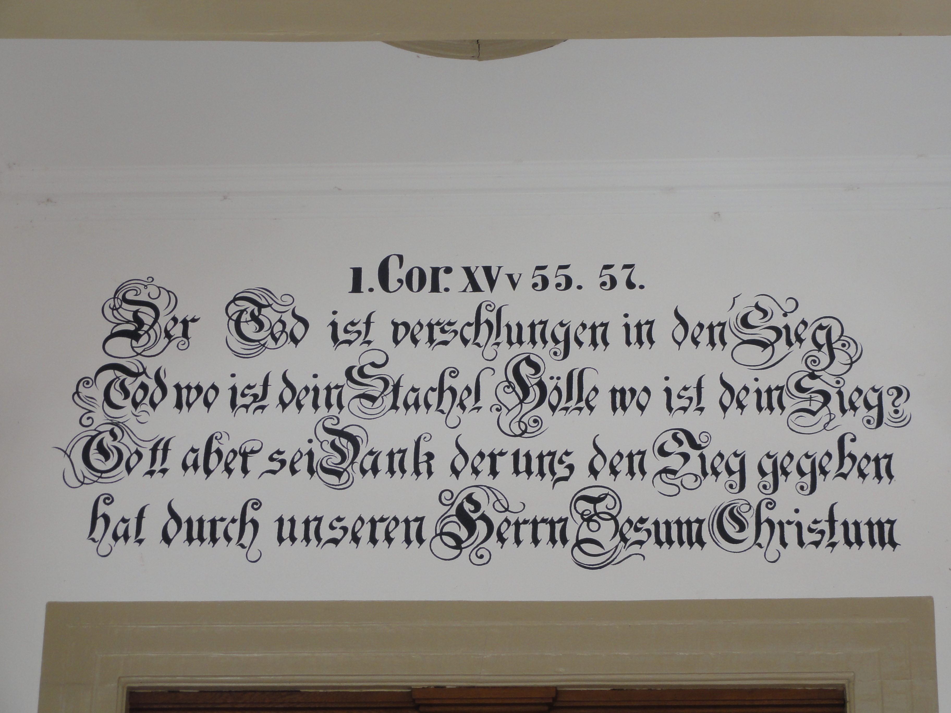 Basel — Inschrift über dem Eingang zur Rosentalkapelle